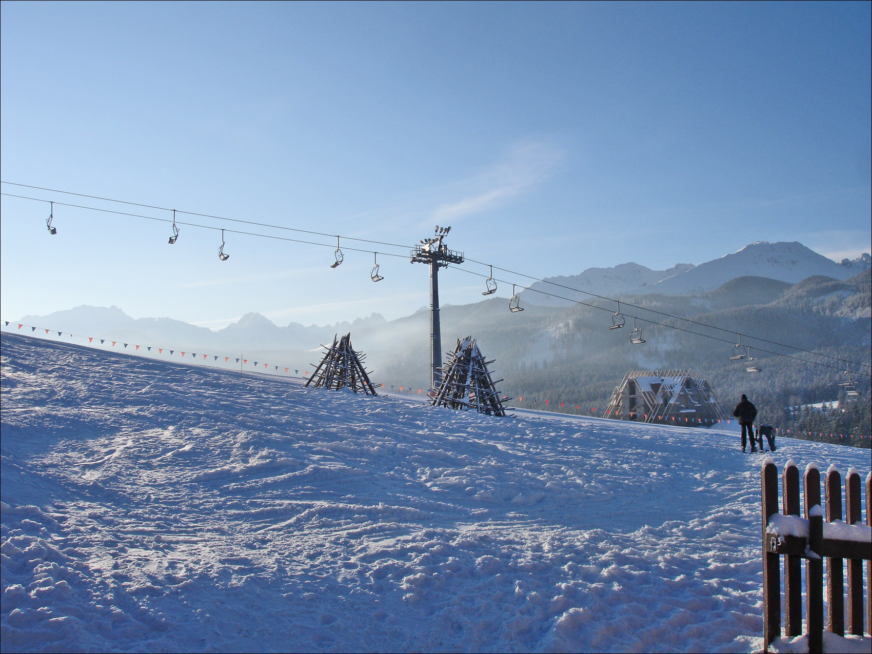 Małe Ciche widok na wyciąg